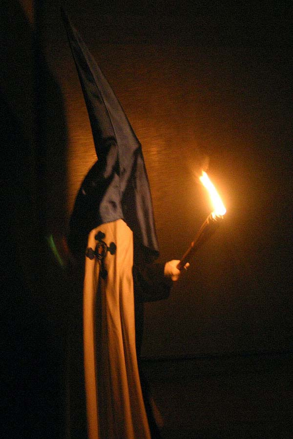 MIEMBRO de la cofradía del Santísimo Cristo de la Agonía de Caudete, Durante la procesión del Silencio, procesión celebrada en la noche del Jueves Santo en La Que Las Calles de Caudete Quedán Totalmente a oscuras, y Bajo El Sonido de la matraca SE ESTA realiza tan emotiva procesión.